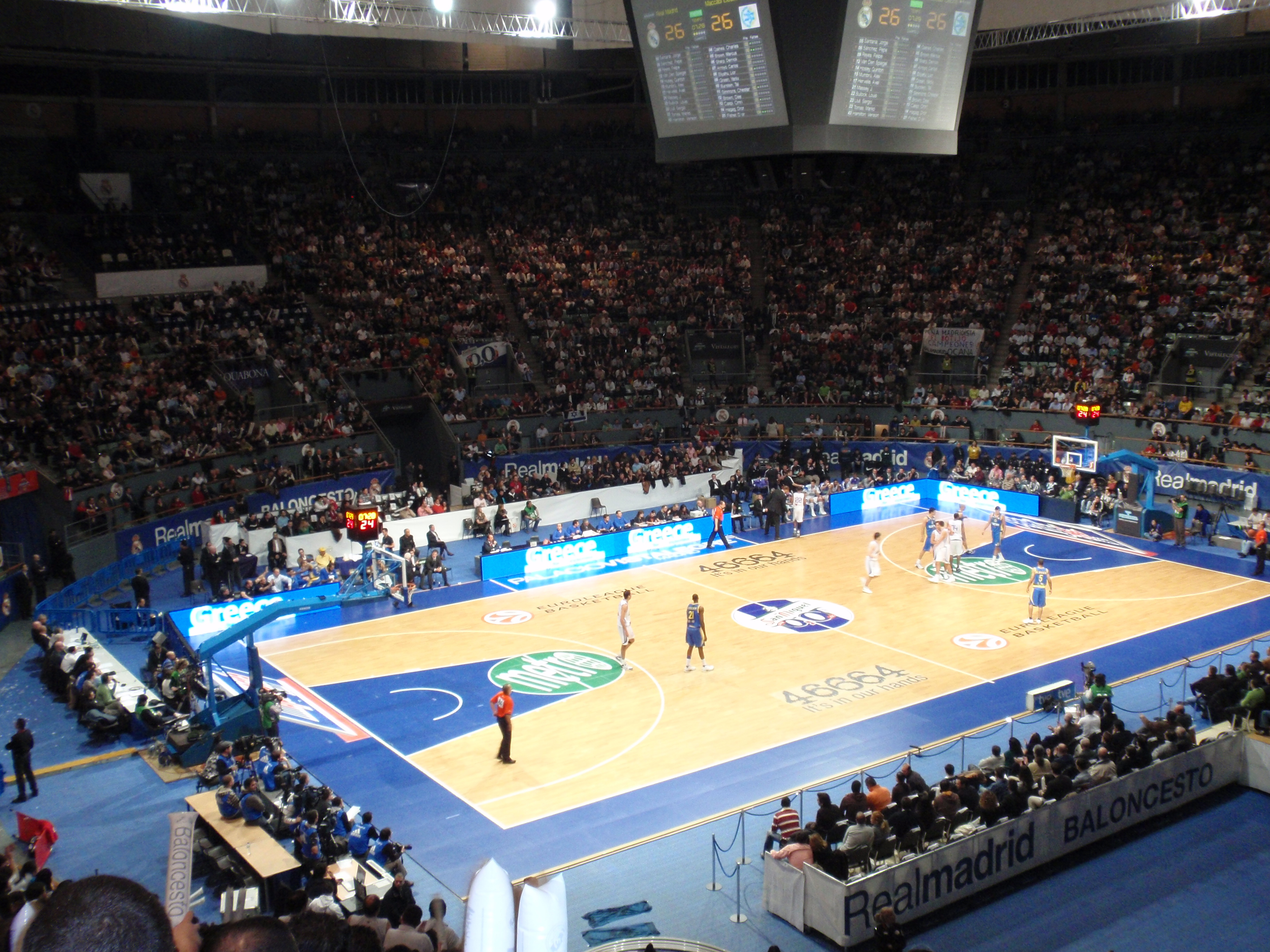 Aspecto de las gradas del Palacio Vistalegre durante el espectacular Real Madrid - Maccabi Tel Aviv correspondiente a la Euroliga 2008-2009.